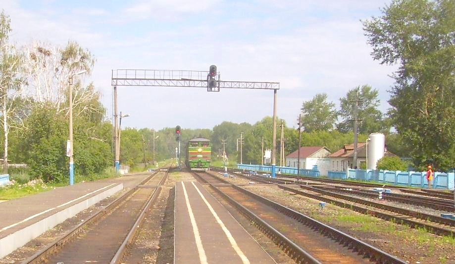 Станция Вернадовка Сызрано-Вяземской железной дороги. Прибывает пригородный поезд на Пачелму. 2012 год.